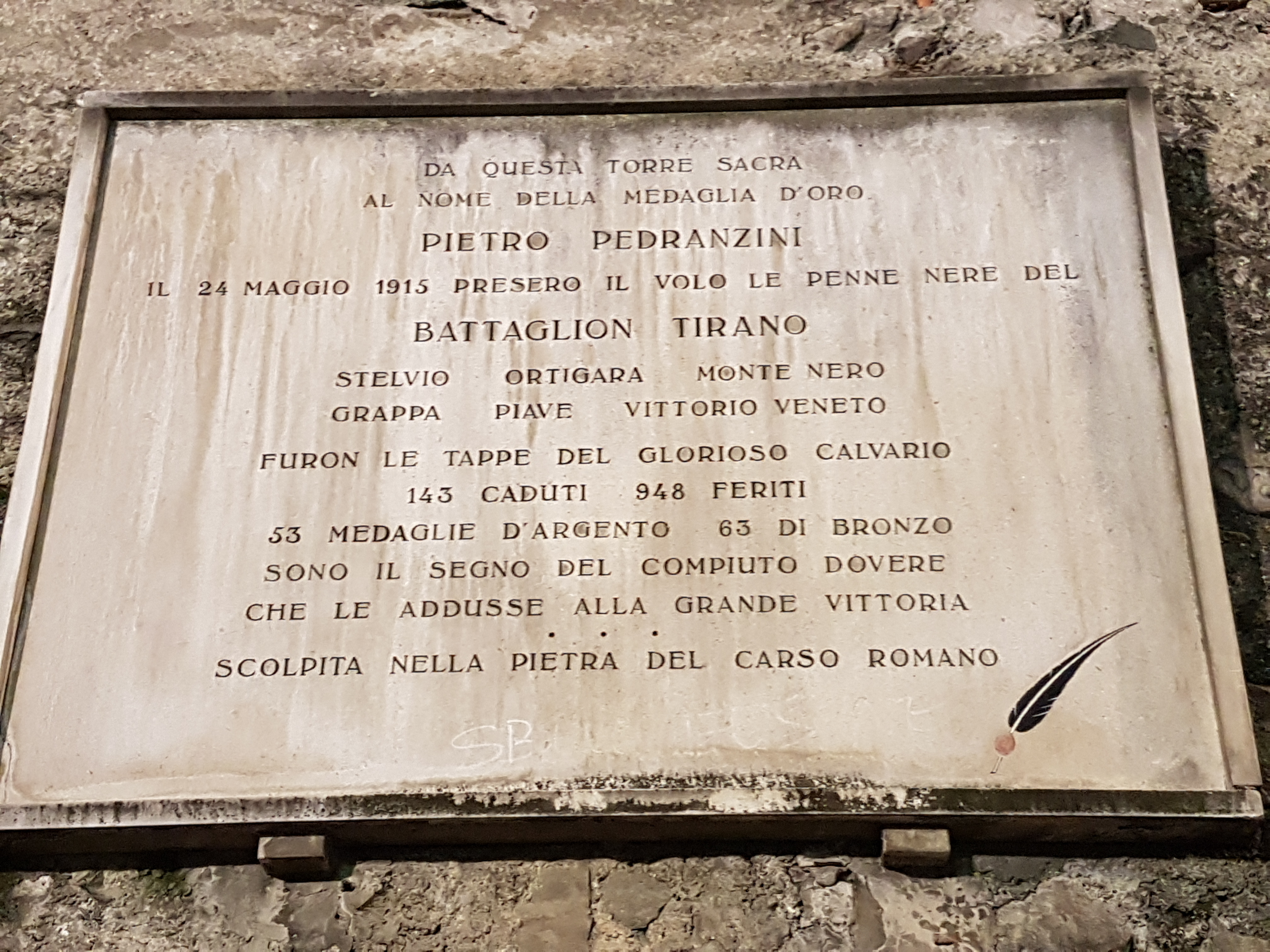 Lapide commemorativa a Pietro Pedranzini, Bormio